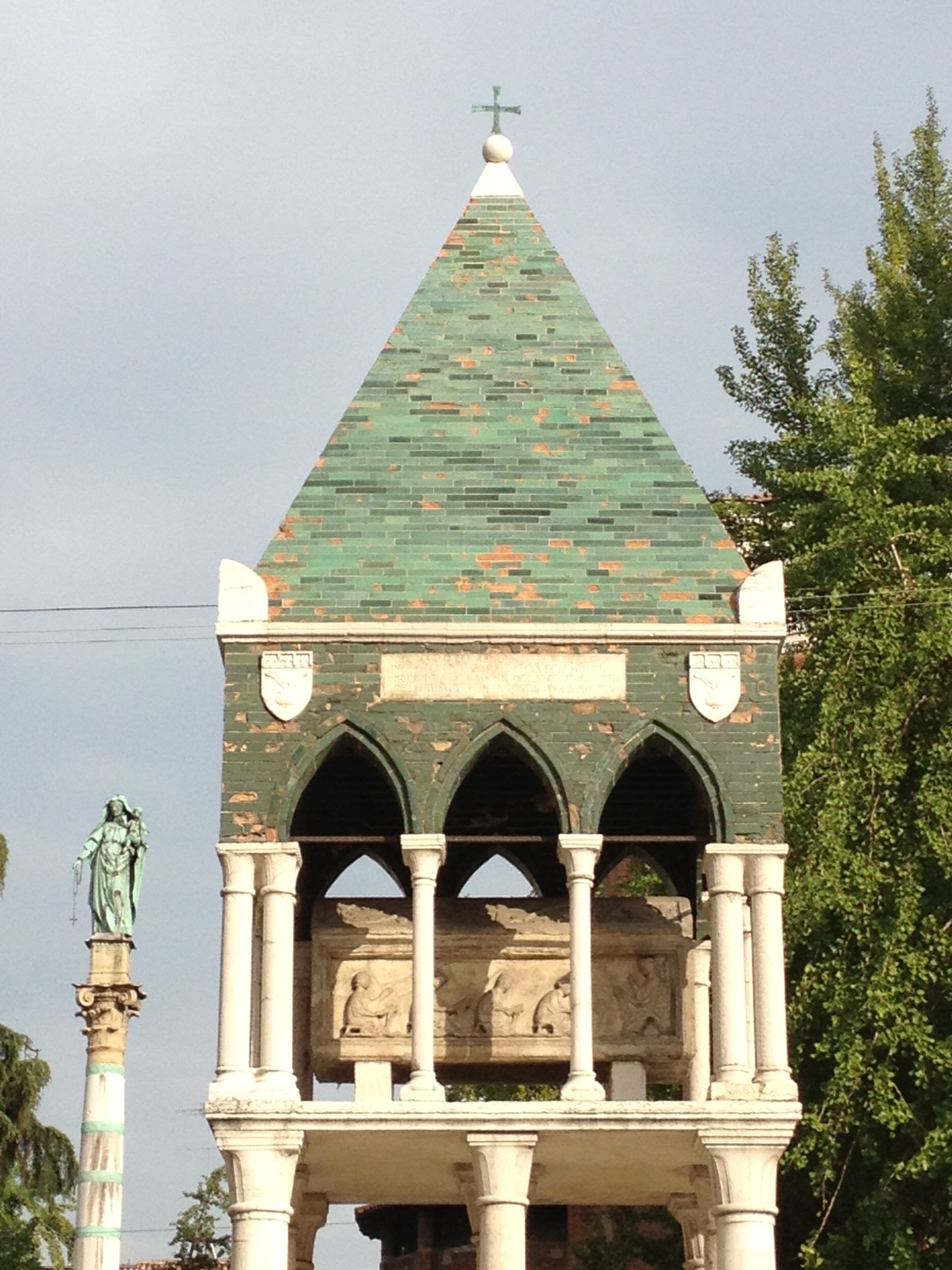 Piazza San Domenico - MIBAC This is a photo of a monument which is part of cultural heritage of Italy.